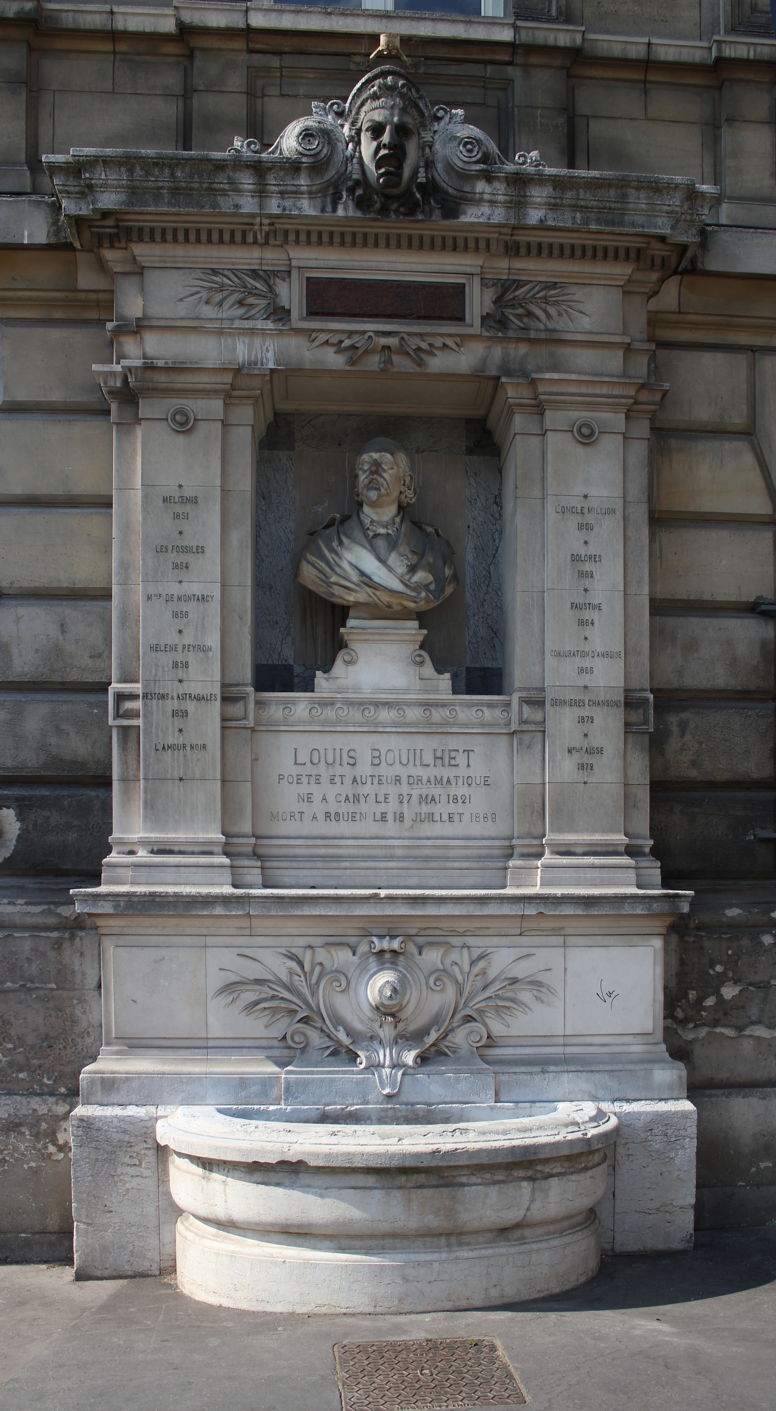 Monument à Louis-Hyacinthe Bouilhet, rue Jacques-Villon à Rouen.